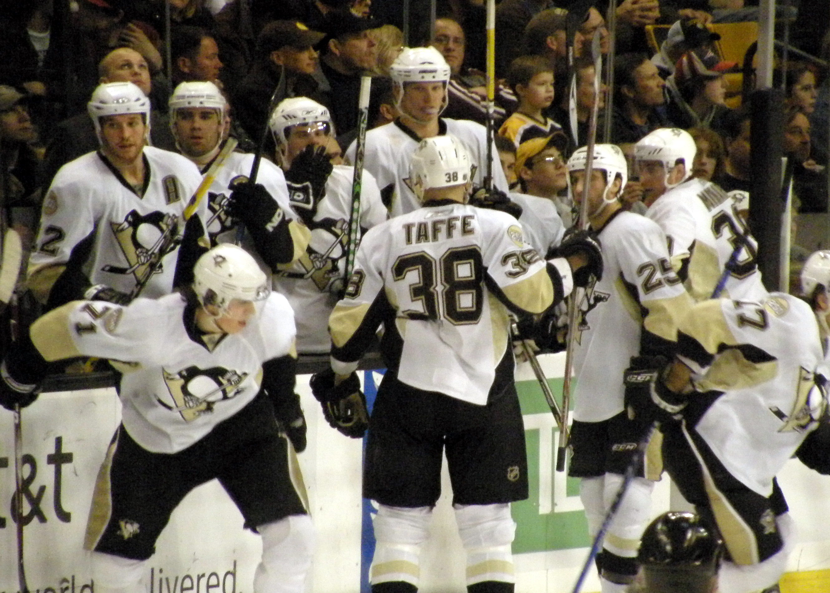 Penguins line change.